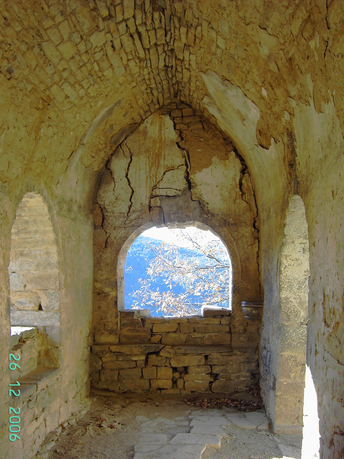 El interior del esconjurador o esconjuradera de Asín de Broto.